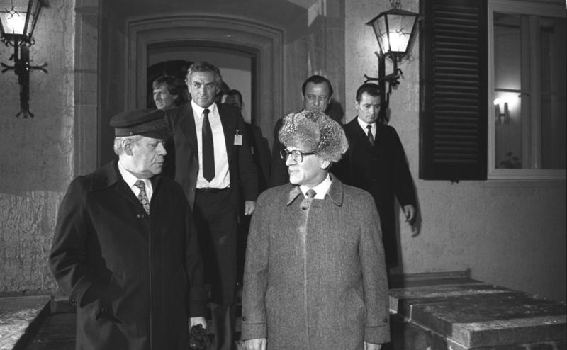 Döllnsee, Erich Honecker und Helmut Schmidt ADN-ZB/Mittelstädt/12.12.81 / Berlin / Besuch / Vier-Augen-Gespräch Das Gespräch Erich Honeckers, Generalsekretär des ZK der SED und Vorsitzender des Staatsrates der DDR, mit dem BRD-Bundeskanzler Helmut Schmidt ging nach zweineinhalb Stunden Dauer zu Ende. Erich Honecker verabschiedete seinen Gast vor dem Gästehaus des Staatsrates am Döllnsee. Abgebildete Personen: Honecker, Erich: Staatsratsvorsitzender, Generalsekretär des ZK der SED, DDR (GND 118553399) Schmidt, Helmut: Bundeskanzler, Verteidigungsminister, SPD, Bundesrepublik Deutschland (GND 118608819)